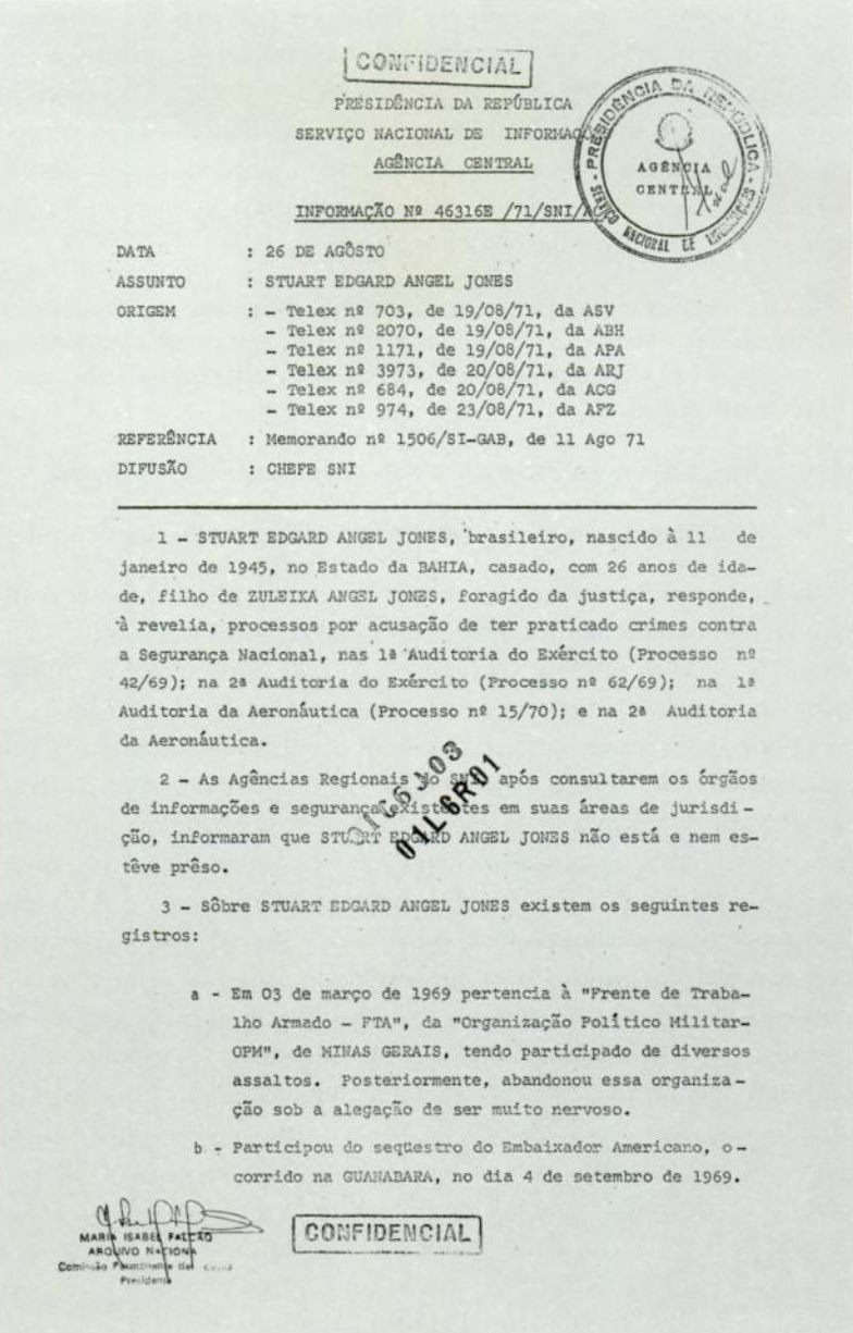 Documento do Serviço Nacional de Informações sobre o guerrilheiro Stuart Angel Jones.